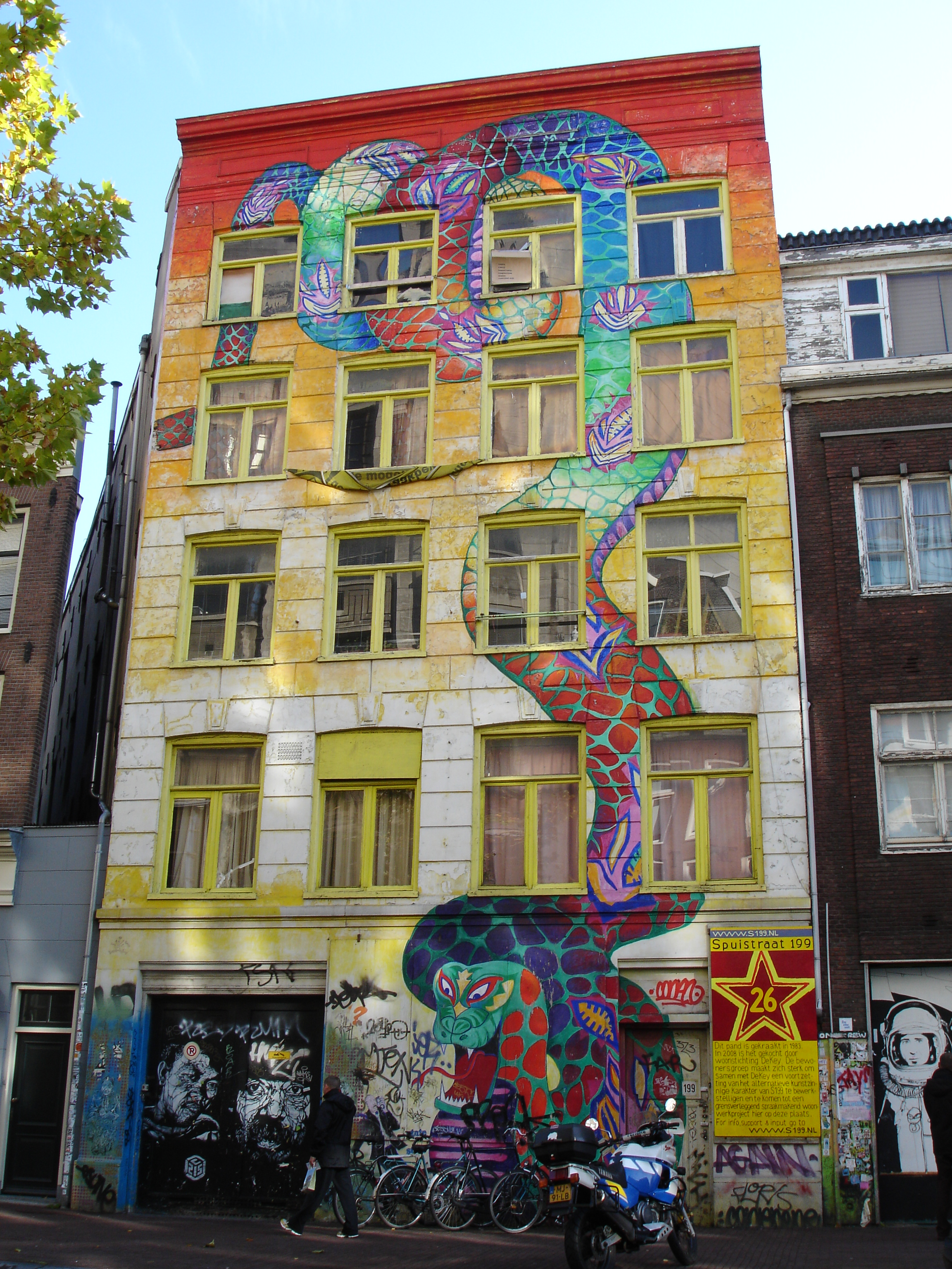 Kraakpand Slangenpand, onderdeel van Tabakspanden